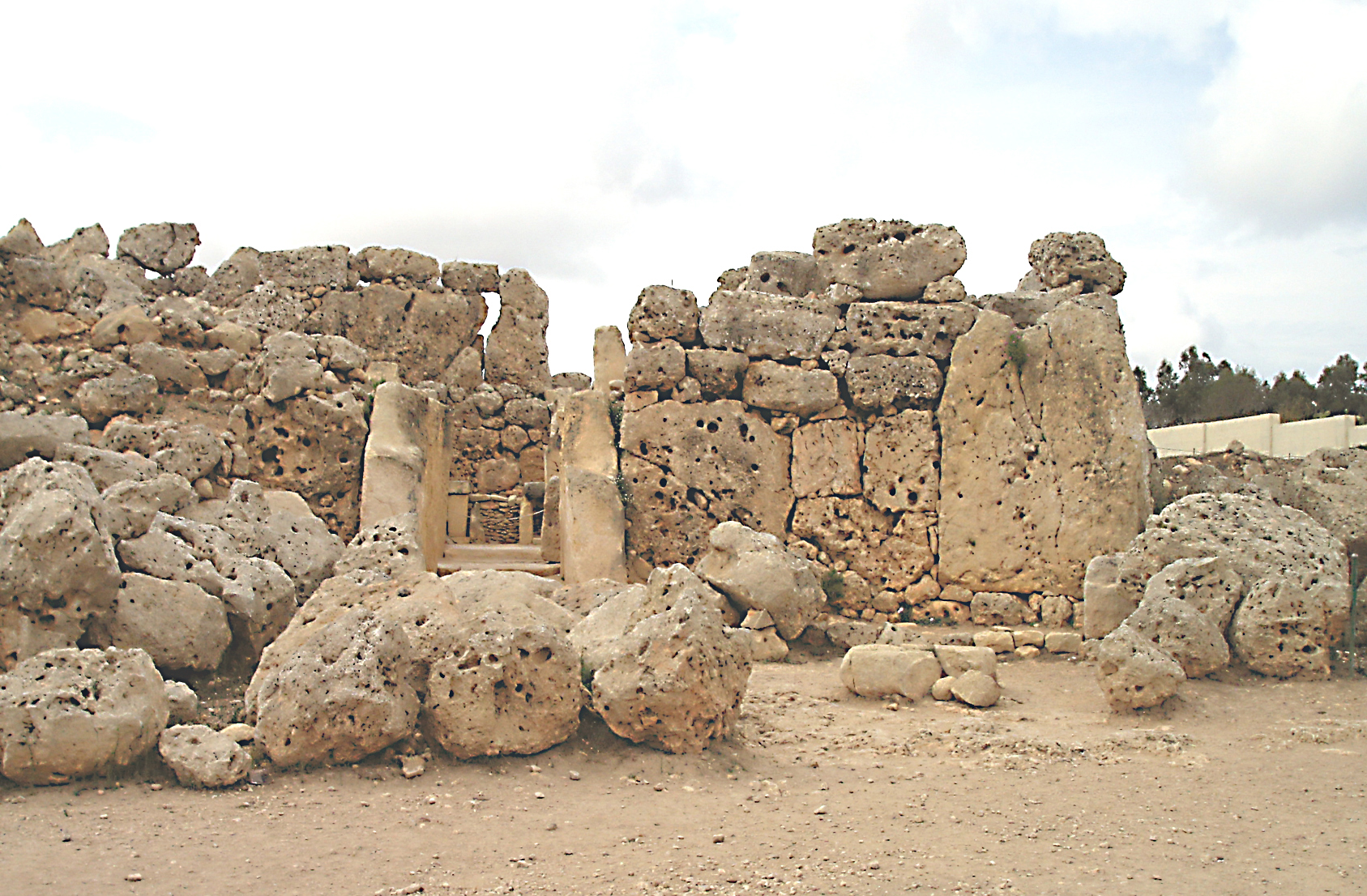 Temple de Ggantija à Gozo